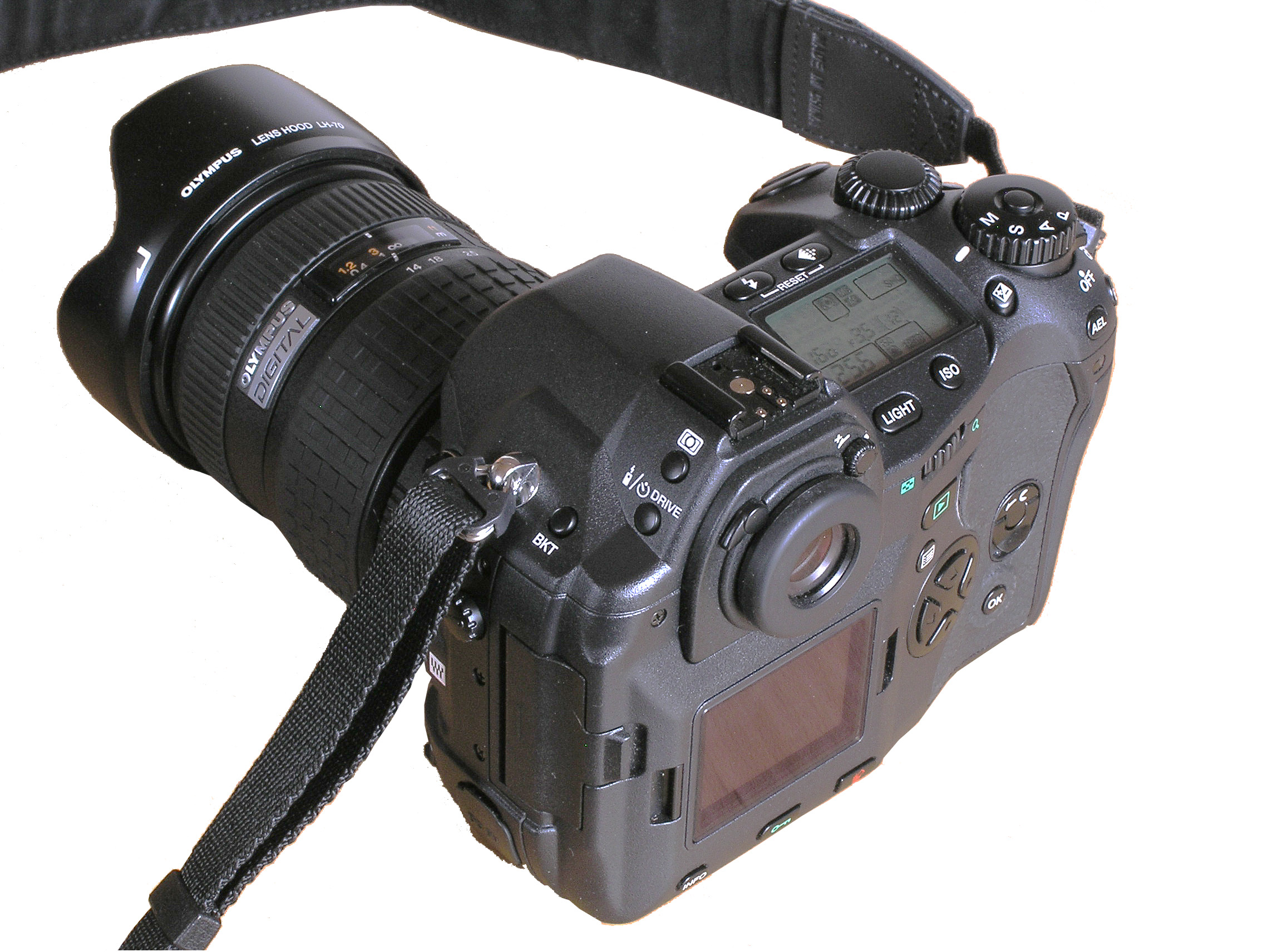 Olympus E-1 seitlich von hinten